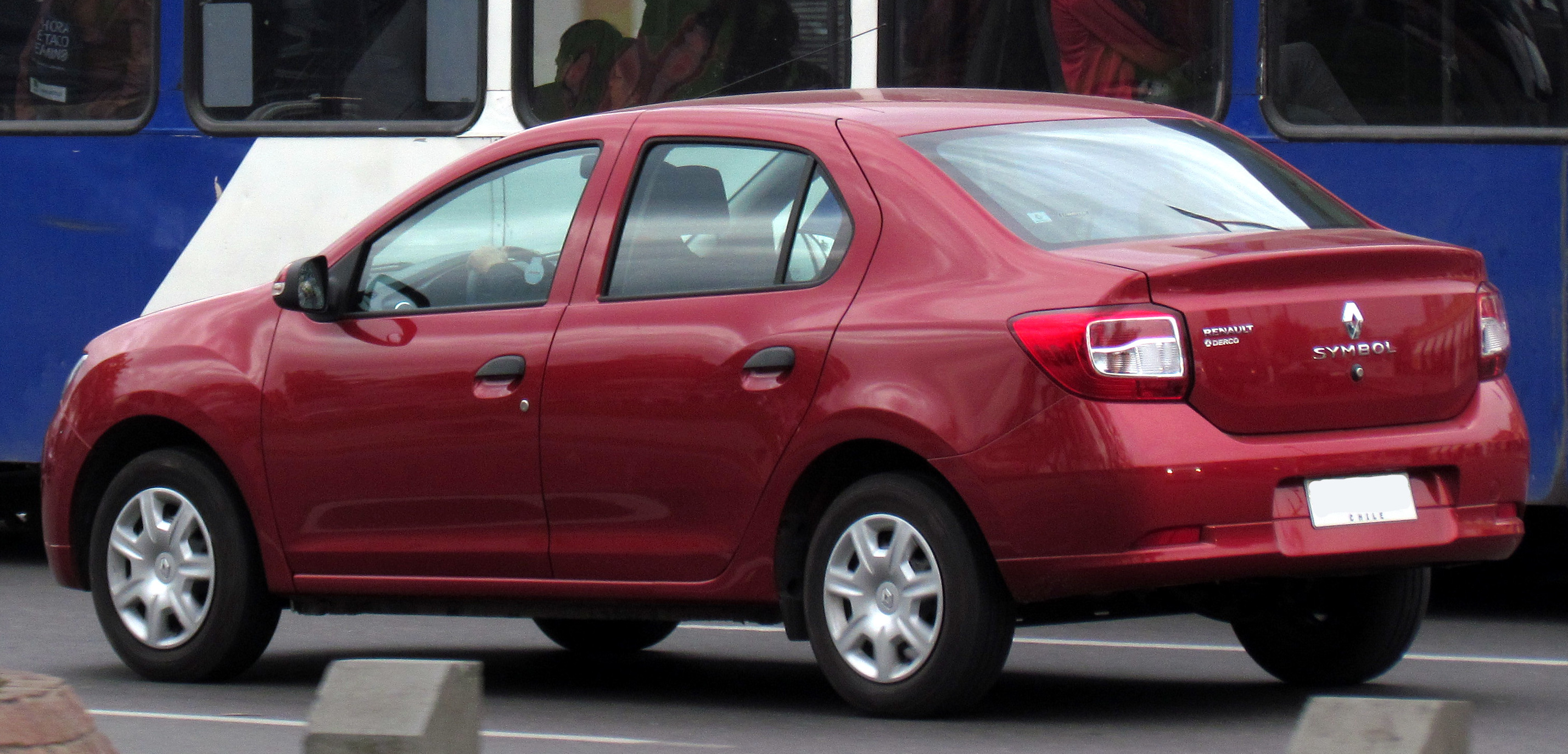 Renault Symbol 1.6 Expression 2014